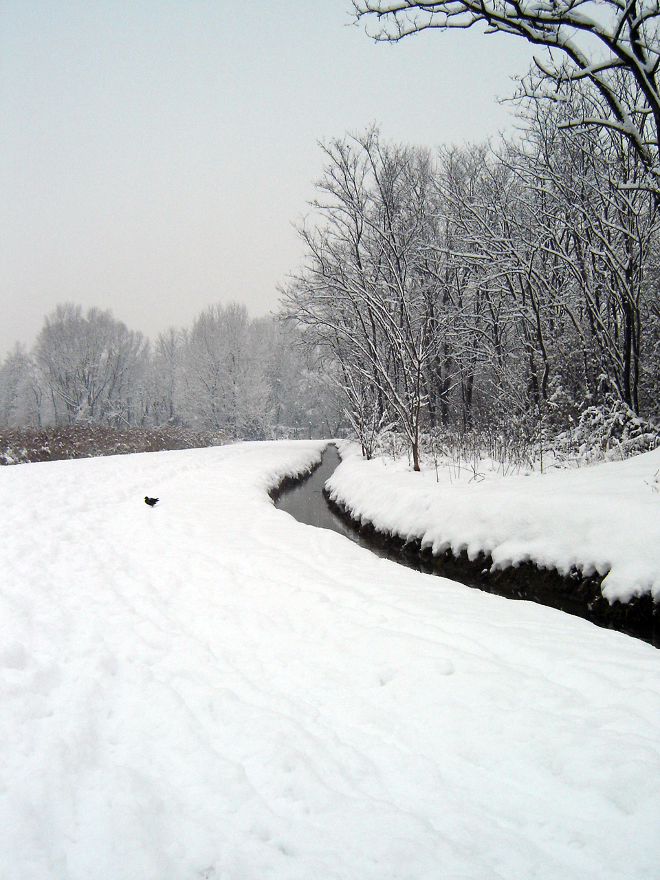 Parco delle Cave. Autore: Riccardo De Benedictis